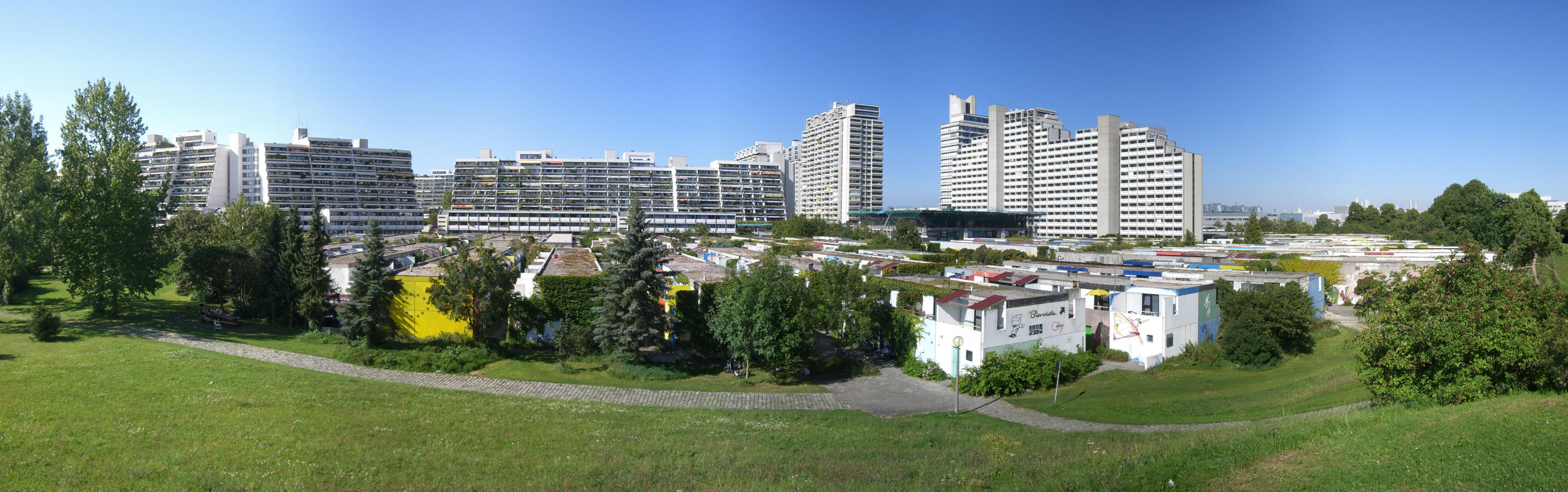 München - Olympisches Dorf (Panorama).jpg